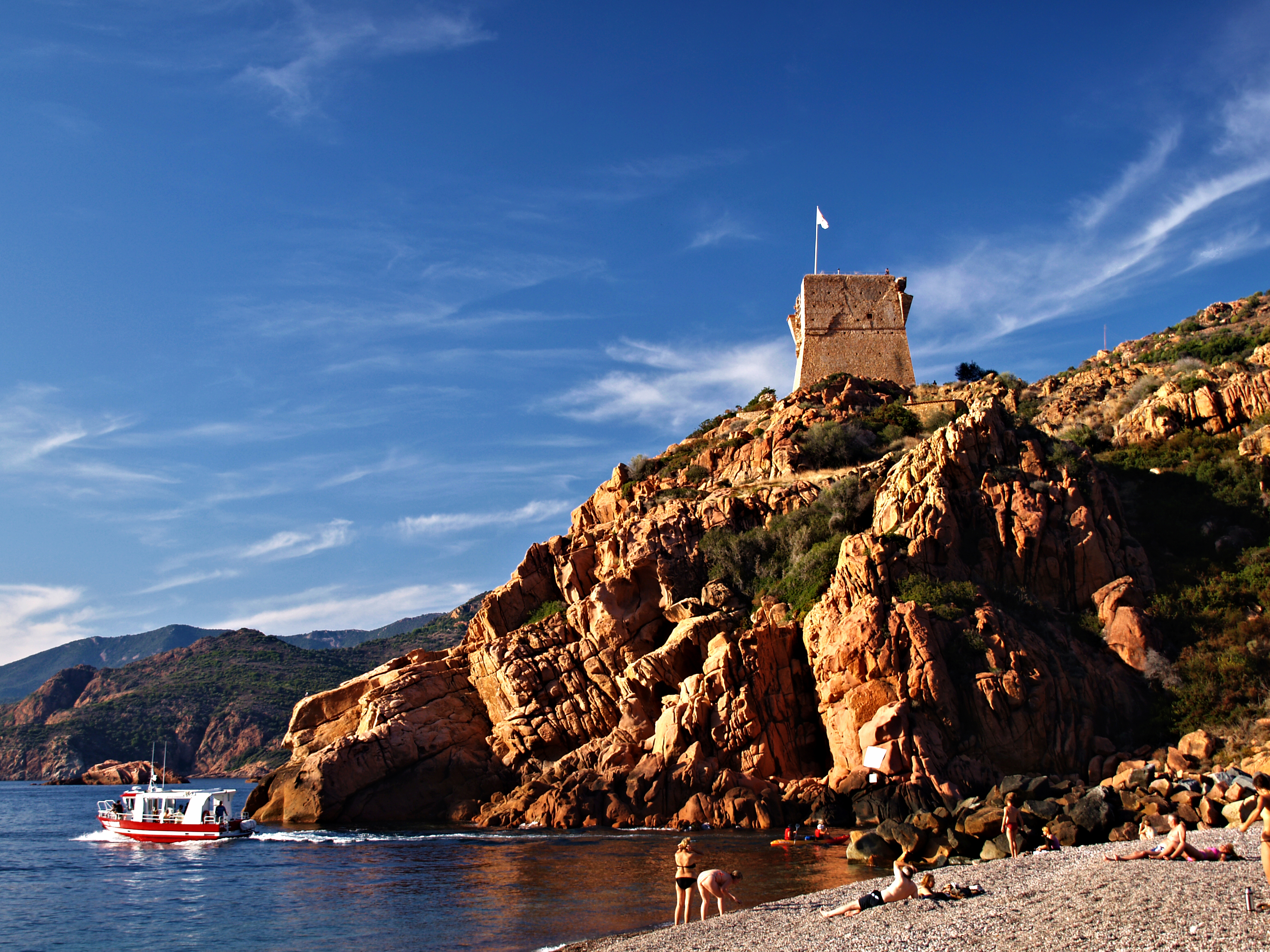 Ota (Corsica) - La tour génoise à l'embouchure de la rivière Porto